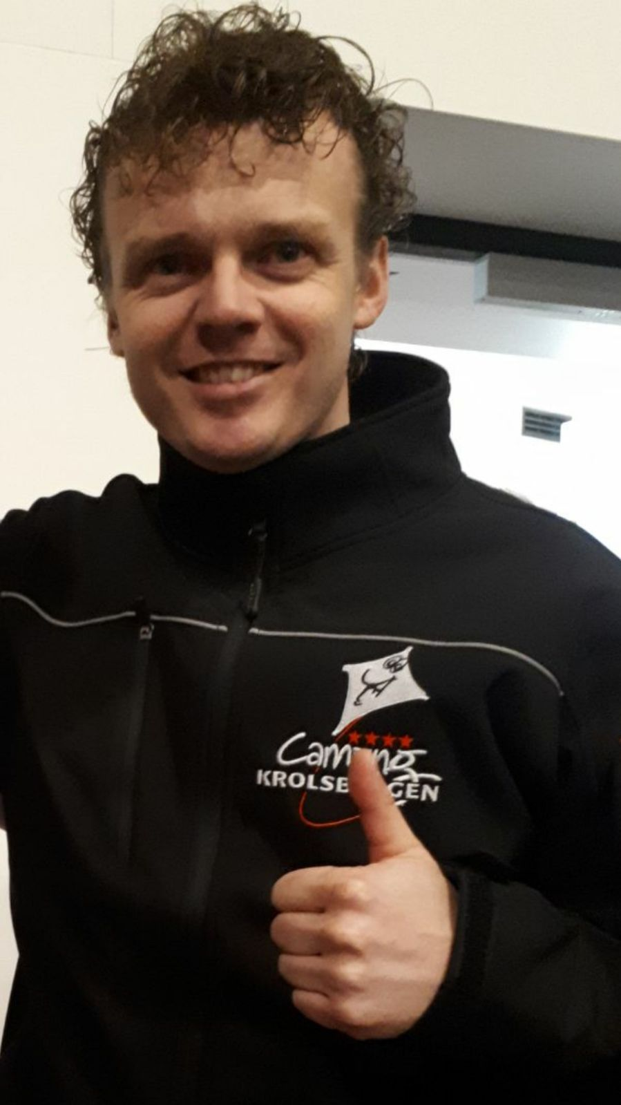 Richard Veenstra op Dutch Open 2018